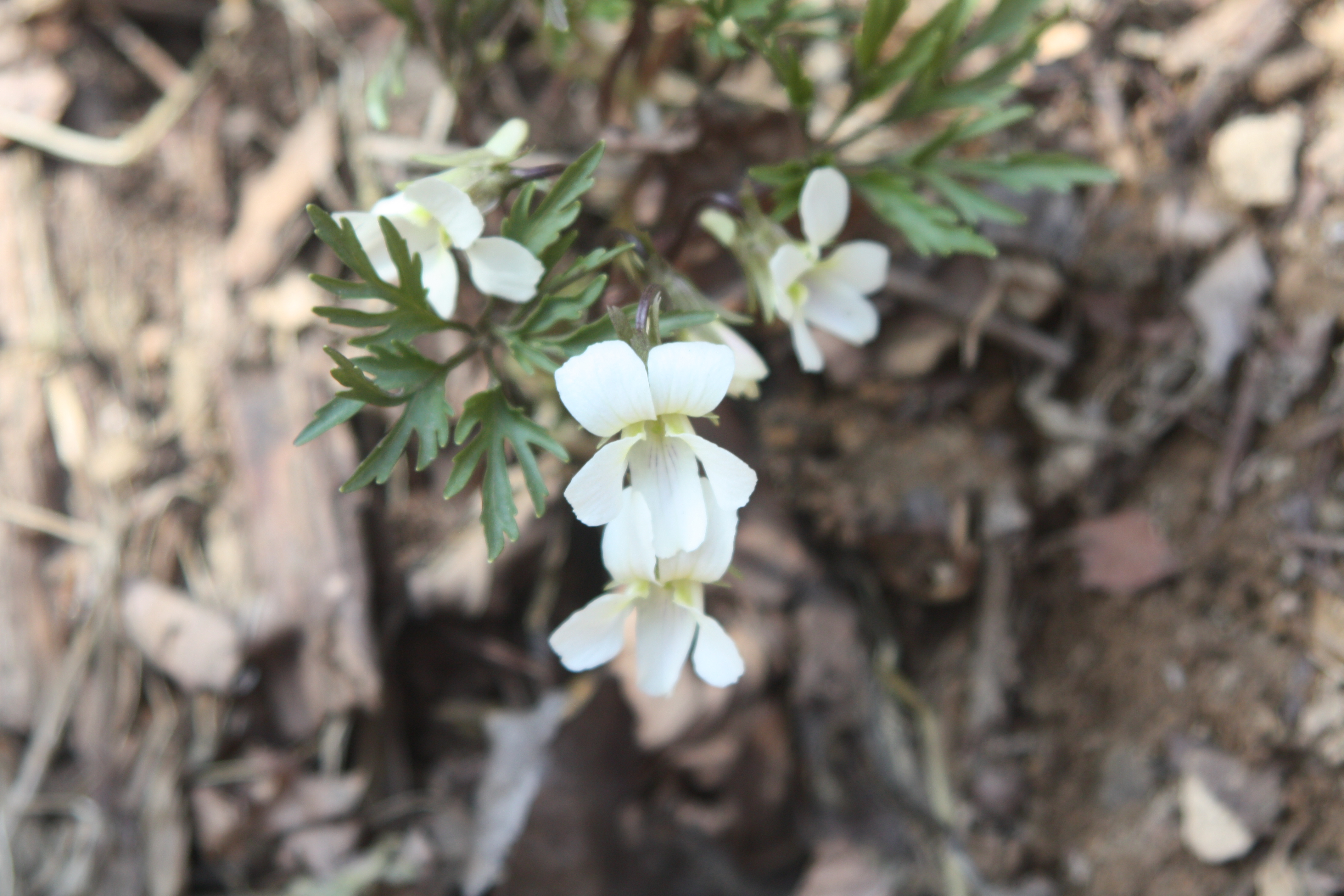 Viola albida var. chaerophylloides (Regel) F.Maek. ex Hara